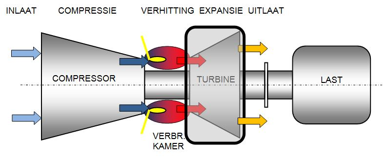 De turbine, deel van een gasturbine